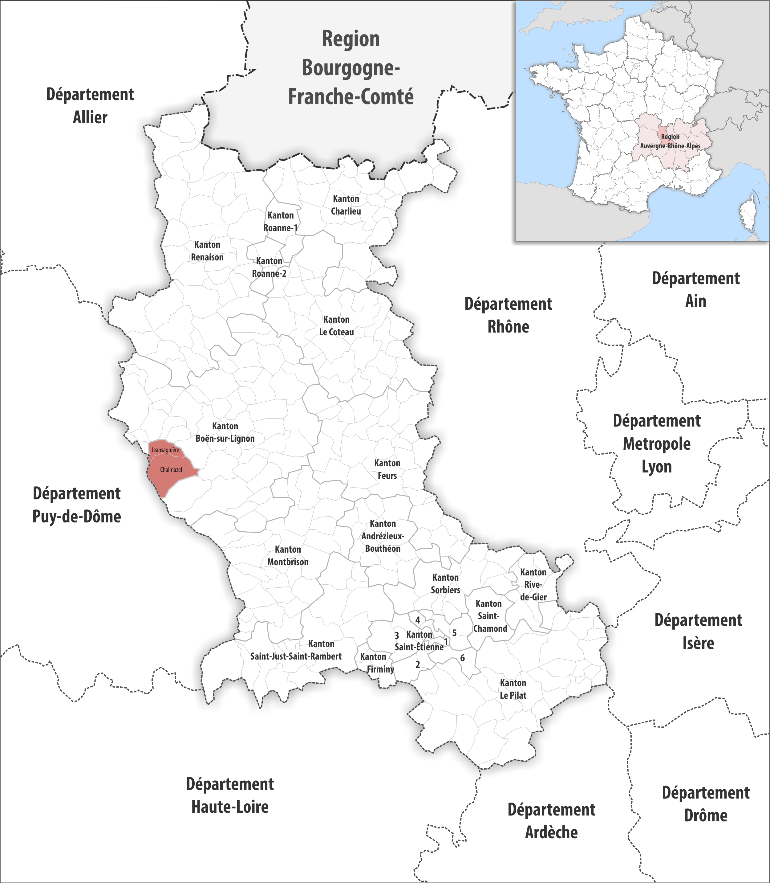 Gemeindeveränderungen im Département Loire auf den 1. Januar 2016